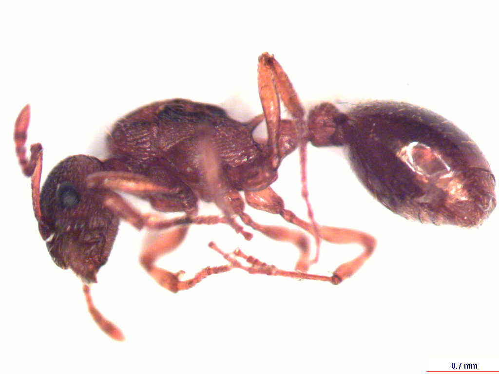 Myrmica rubra